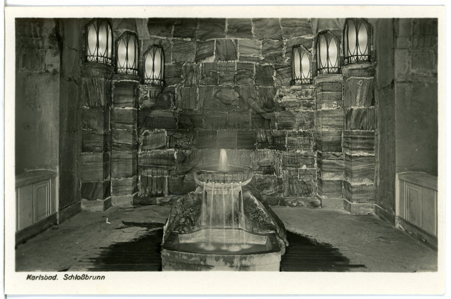 Karlsbad; Schloßbrunnen This postcard is from publisher Brück & Sohn in Meißen ( postcard has a unique number 25526 and is available in a higher resolution at the publisher. This images was uploaded in a cooperation project between Wikipedians and the publisher.